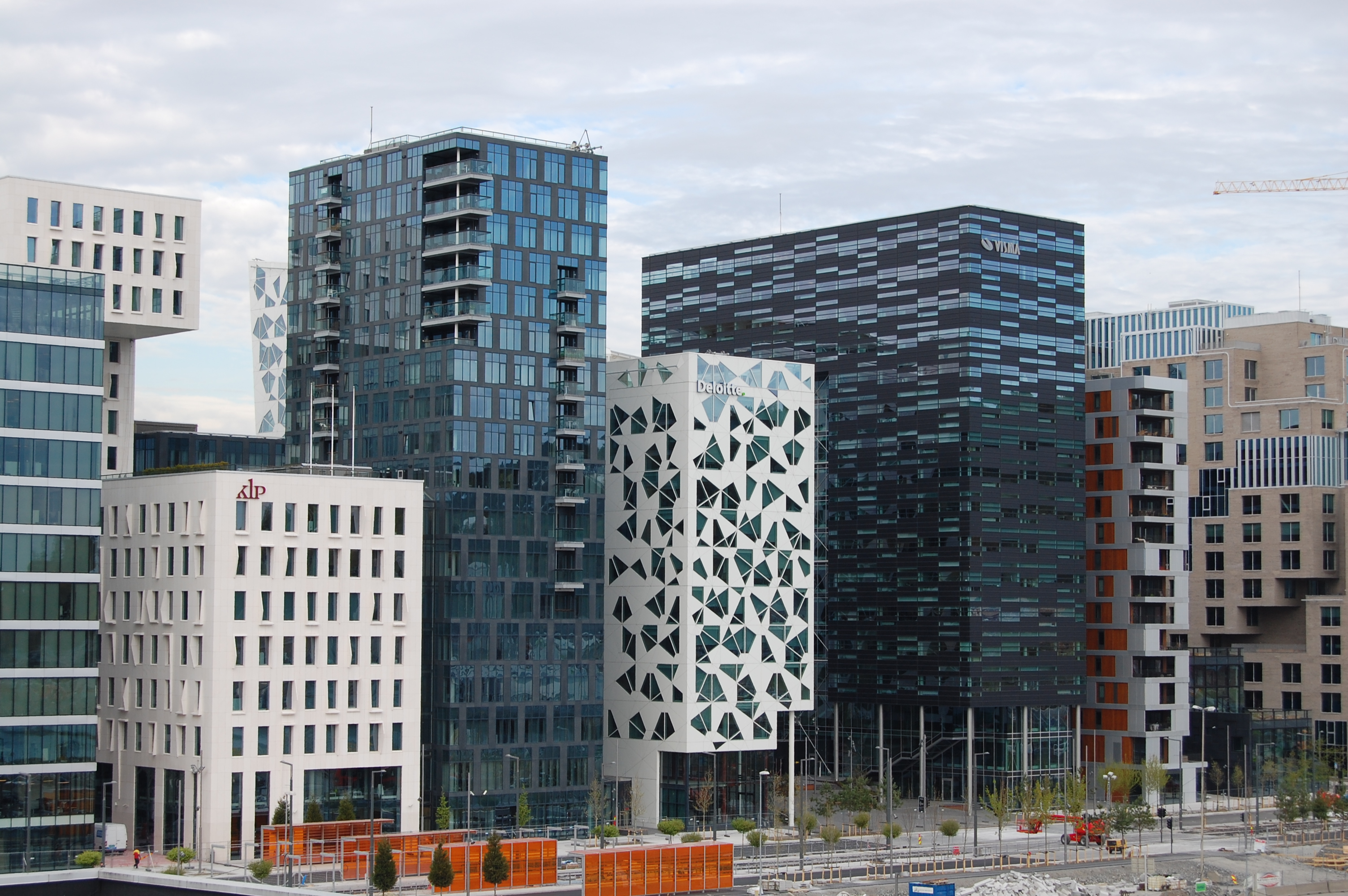 "Barcode"